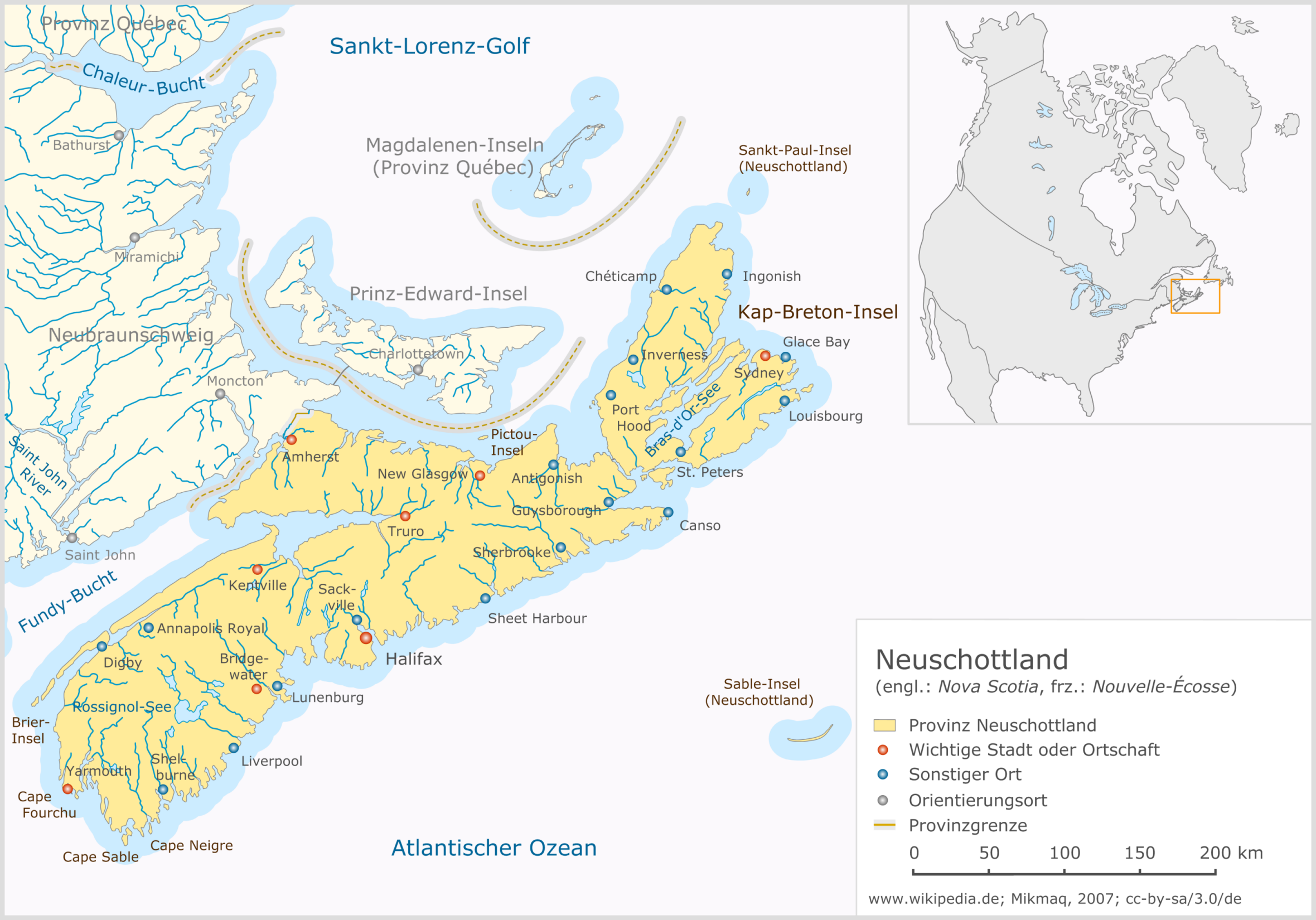 Neuschottland